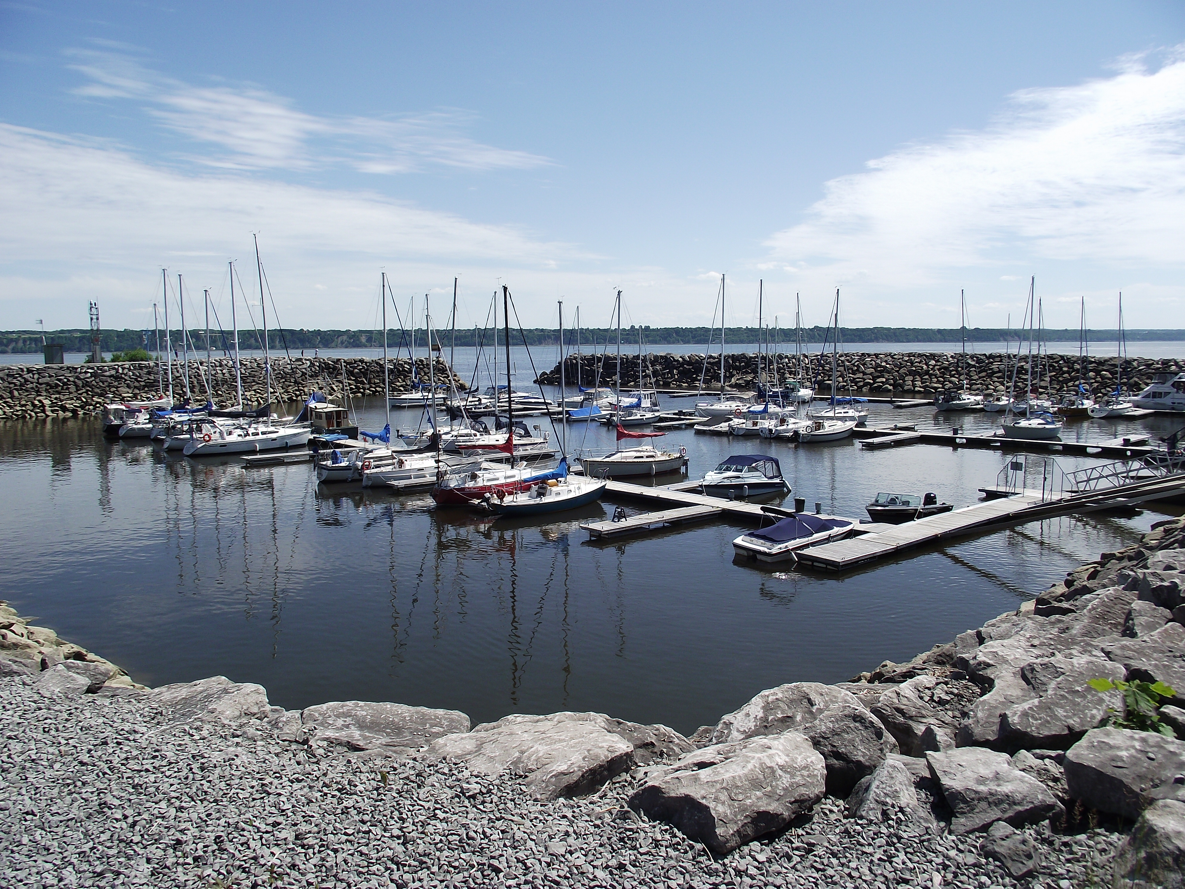 Image de Neuville provenant du concours Wikipédia prend Québec.